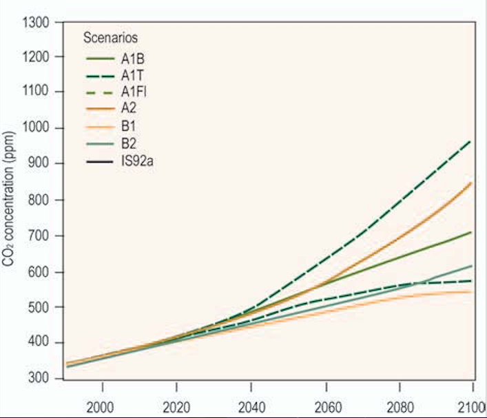 Српски (ћирилица): Предвиђене концентрације CO2 по ИПЦЦ сценаријима до краја 21. века